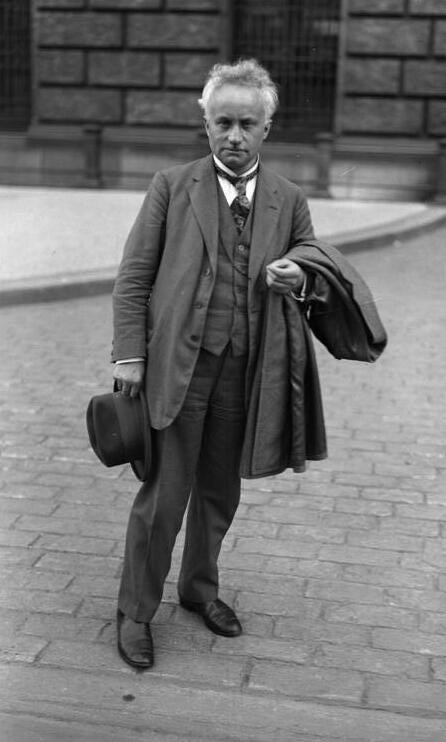 In der großen Sitzung der Sozialdemokratischen Fraktion in der Bewilligung des Panzerschiffes A! Reichsinnenminister Severing begibt sich zu den Besprechungen in der Angelegenheit des Panzerschiffes A zum Reichskanzler Hermann Müller.